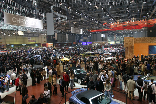 Autosalon Genf, Schweiz Url: Model: Canon EOS 10D Resolution: 180dpi Camera Serial Number: 530207803 Image Number: 1111156